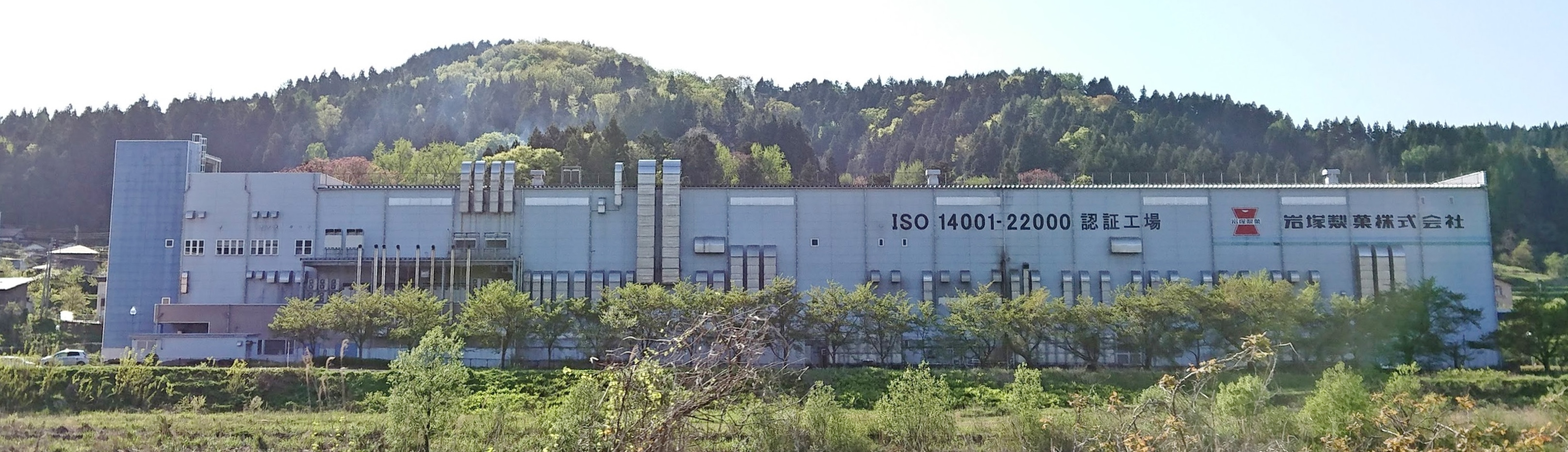 岩塚製菓飯塚工場の外観